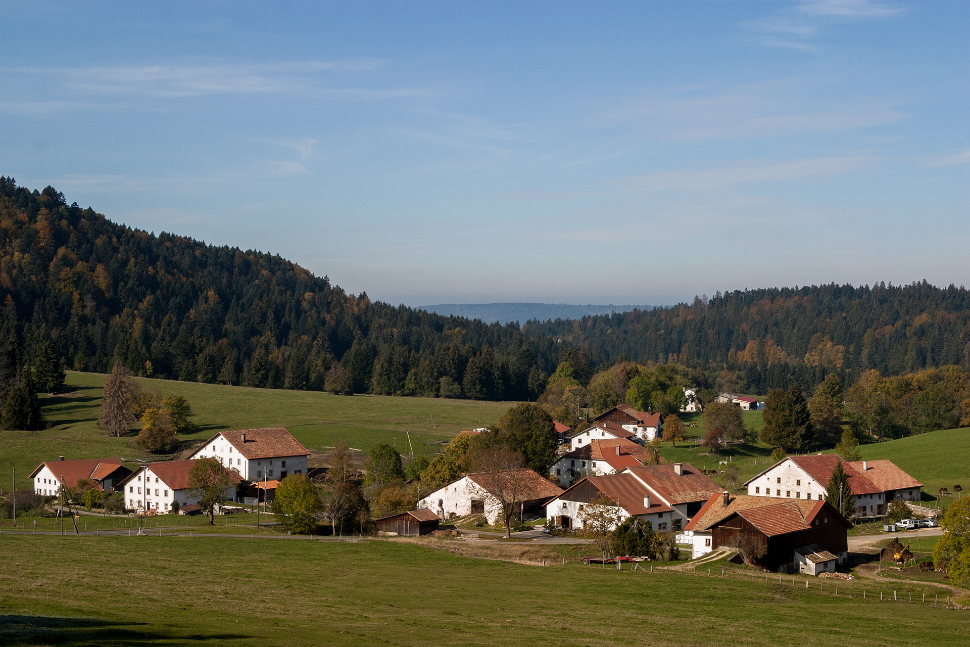 Weiler La Bosse (Gemeinde Le Bémont) JU